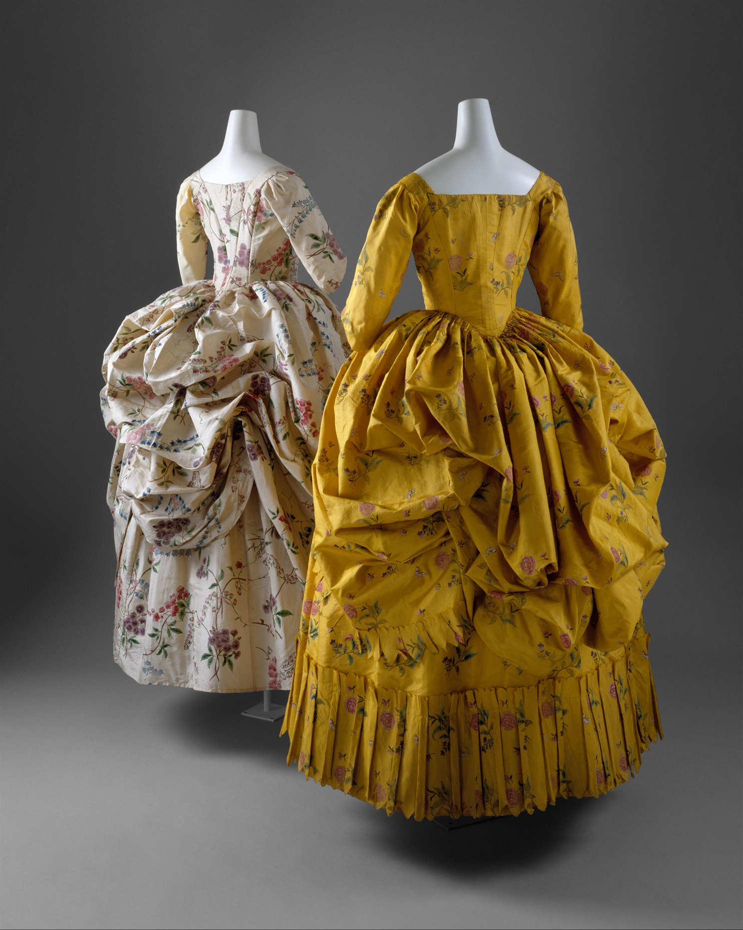 American; Robe à la Polonaise